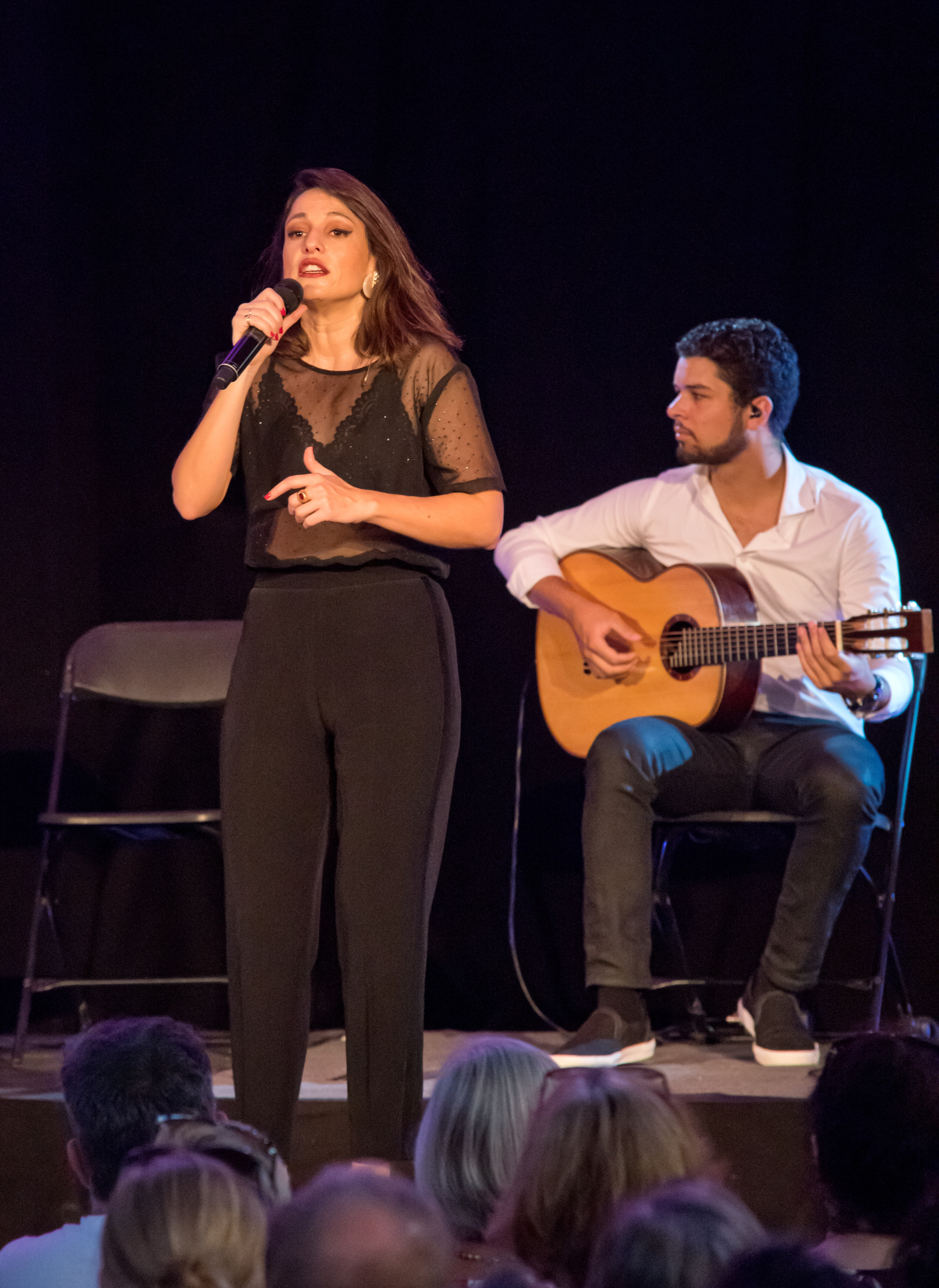 Bilder vom Zelt Musik Festival 2018 in Freiburg im Breisgau Auftritt Carminho am 24. Juli 2018 im Spiegelzelt